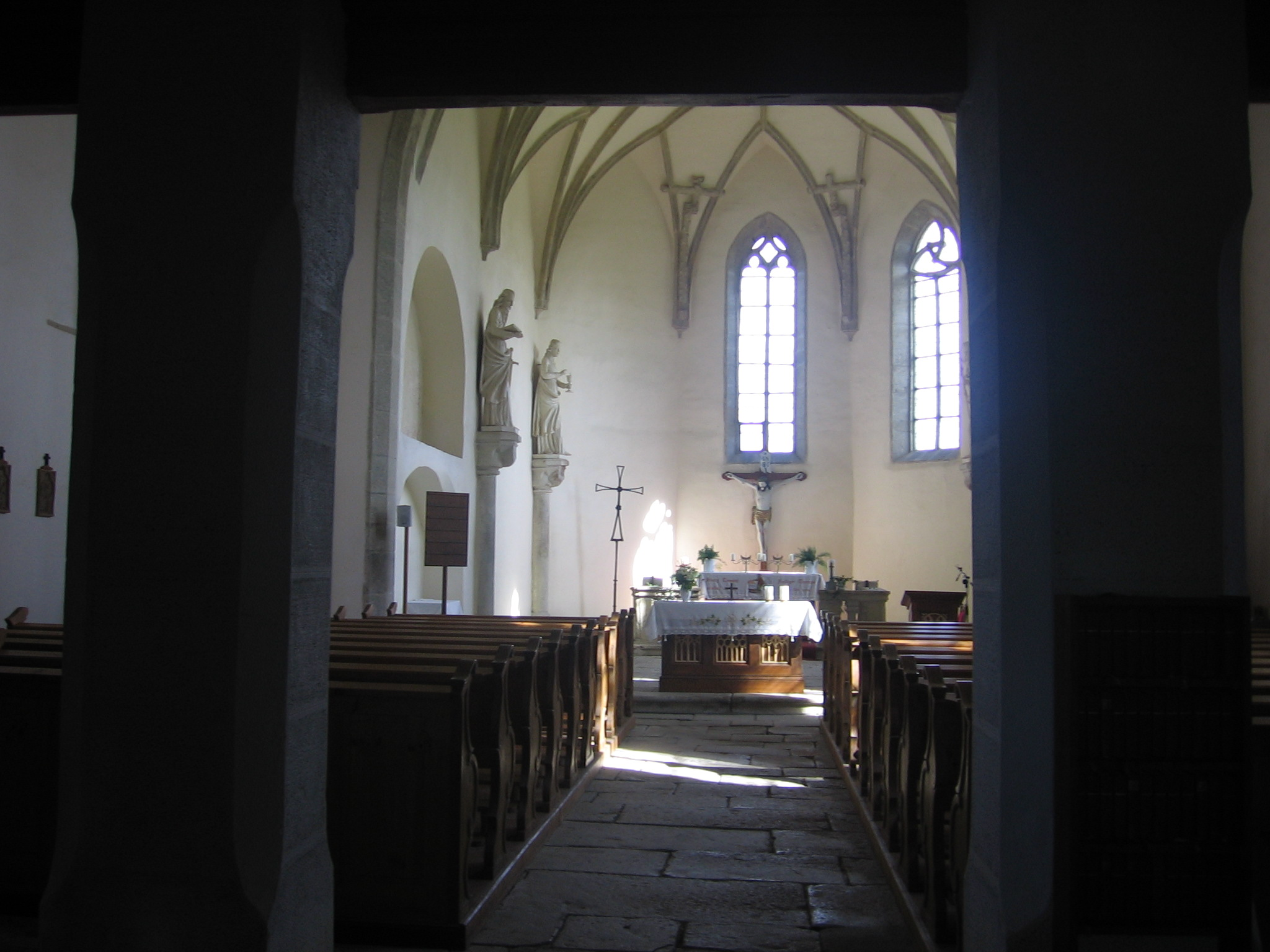 Interiér kostela svatého Tomáše, v obci po hradem Vítkův kámen, Svatý Tomáš (Přední Výtoň).